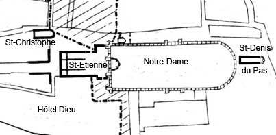 Anciennes églises de l'île de la Cité et plus particulièrement autour de l'emplacement de la cathédrale Notre-Dame actuelle, vers 1112-1116 (d'après un schéma de l'article d'Aubert Marcel intitulé "Les anciennes églises épiscopales de Paris St-Etienne et Notre-Dame, au XIe siècle et début du XIIe"). Voir site Persée ici.